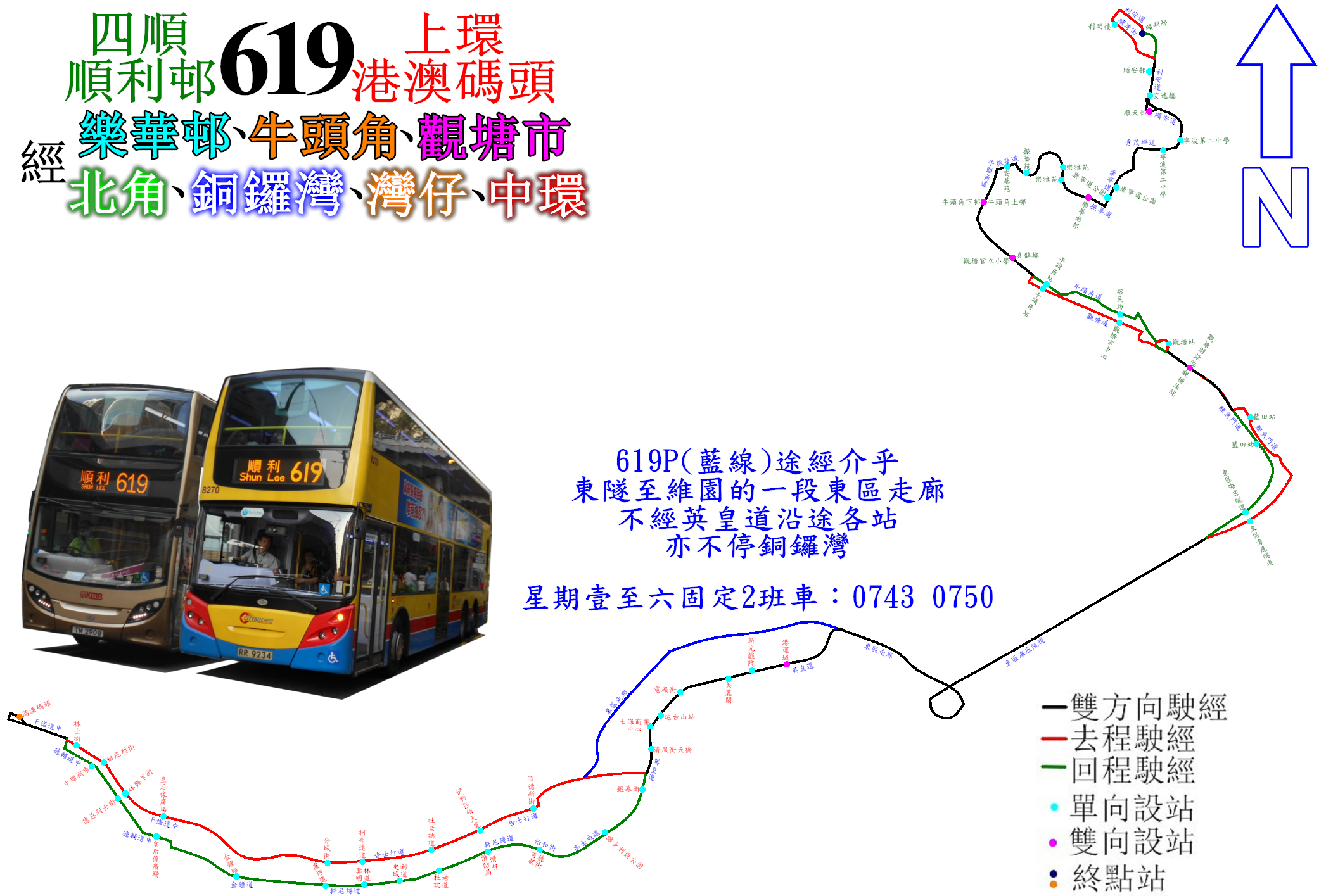 中文（香港）: 過海隧巴6190線的走線圖